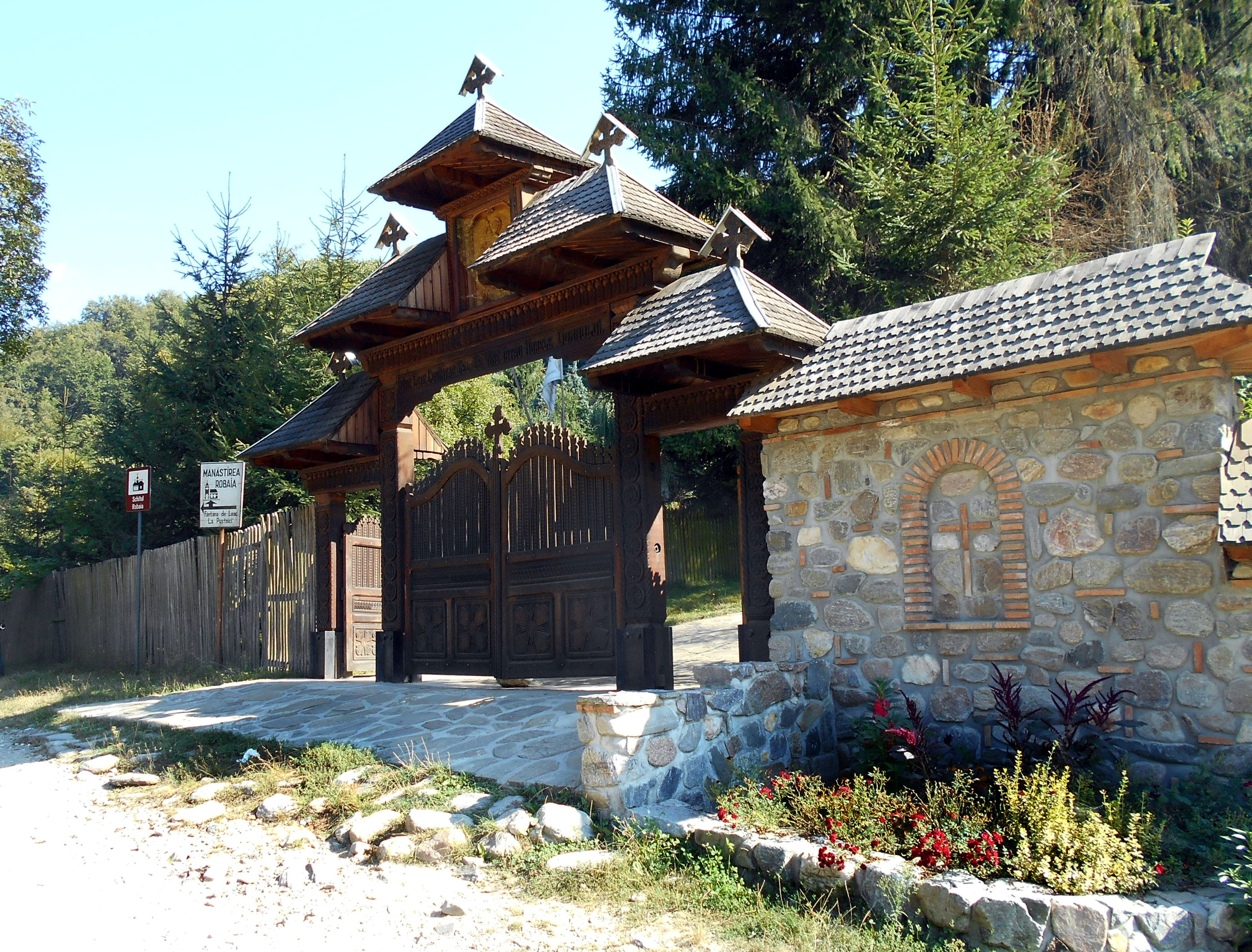 Manastirea Robaia - poarta